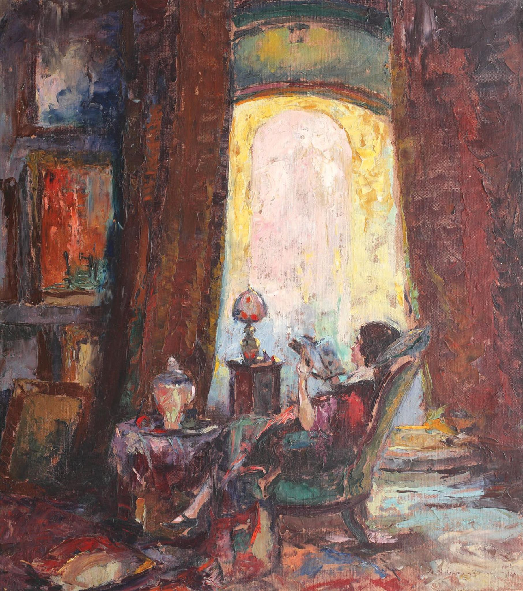 Lectură, lei pe pânză lipită pe carton, 80,5 × 72 cm